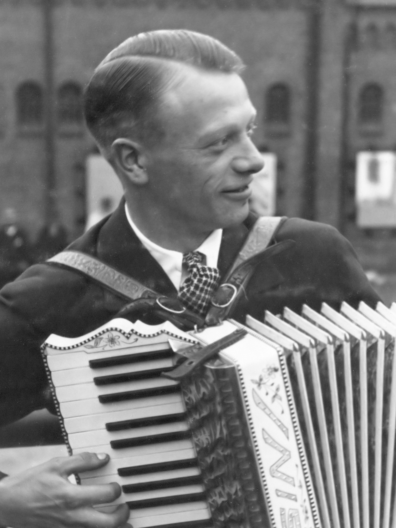 Jaap Mol, spelend op zijn accordeon, op het dak van Hotel Bristol in Arnhem, waar het Nederlands elftal zich verzameld heeft voor de reis naar Italië. Nederland - Zwitserland (2-3), gespeeld op 27 mei 1934 in het San Siro-stadion in Milaan tijdens de Wereldkampioenschappen in Italië. 1934